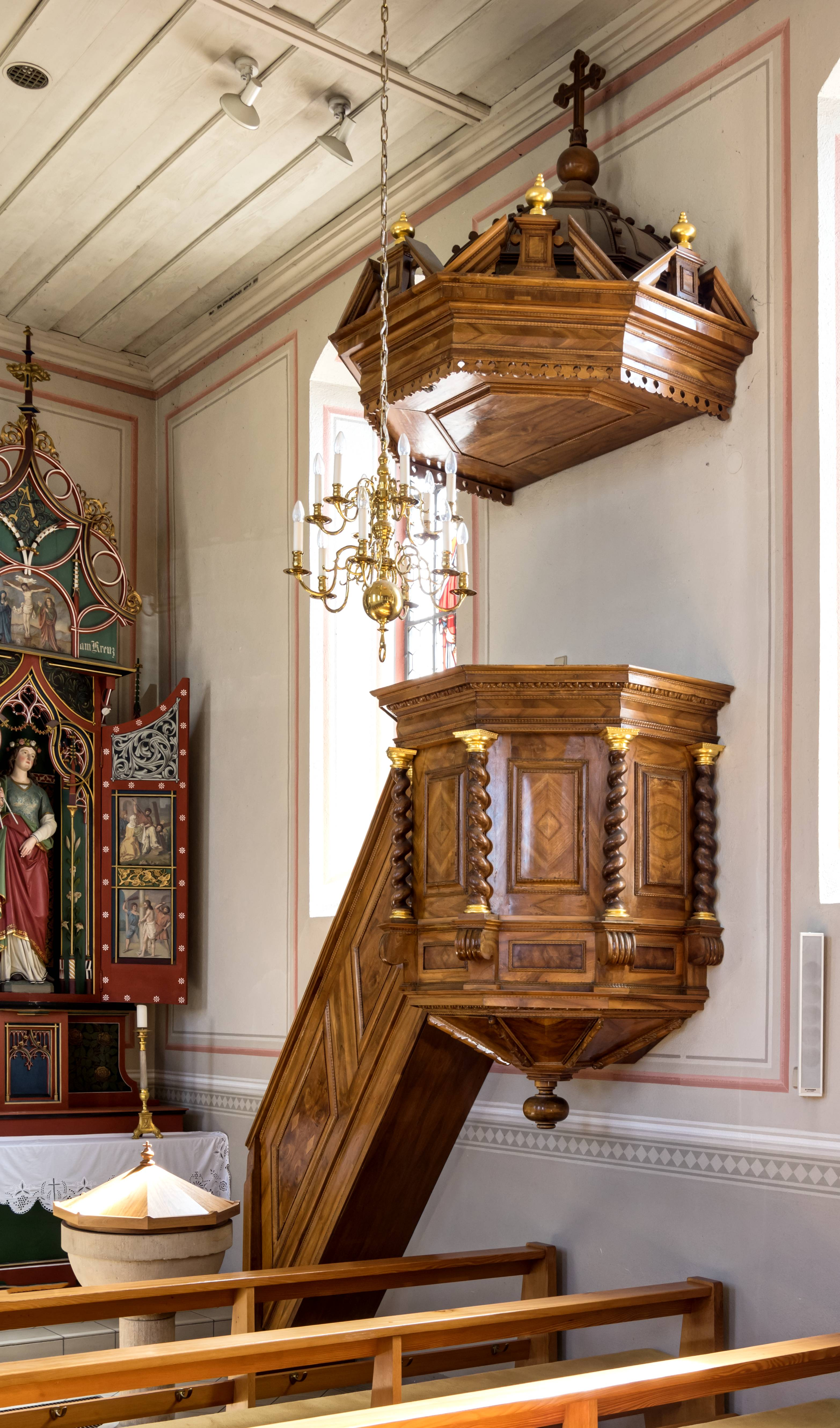 St. Agatha in Grunern, einem Teilort von Staufen Die Kanzel